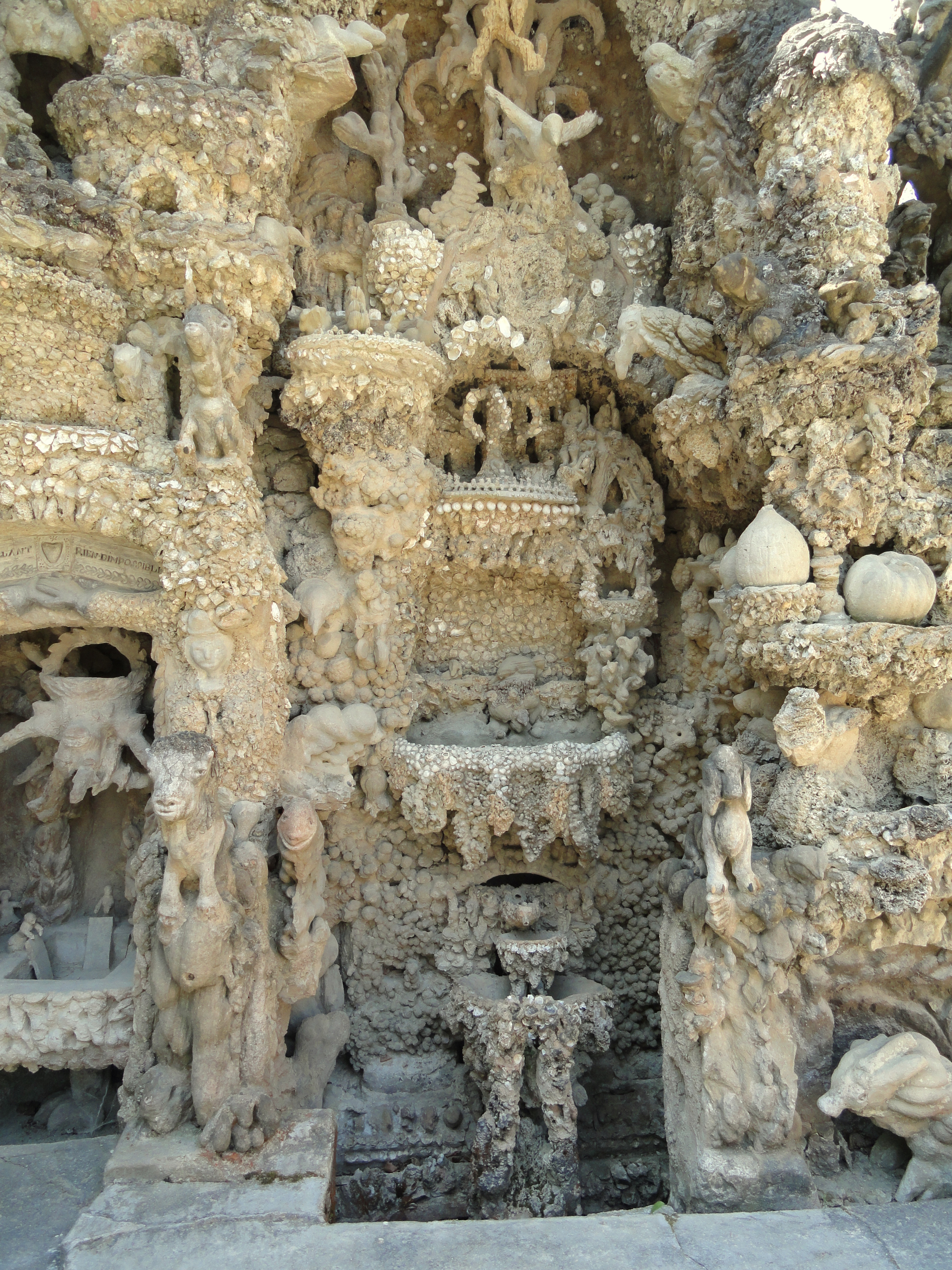 Palais Idéal, Hauterives, Drôme, France.